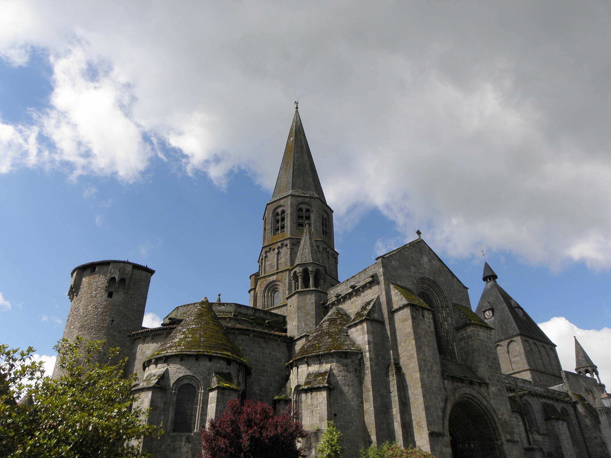 Chevet et flanc nord de la collégiale Saint-Pierre du Dorat (87). .